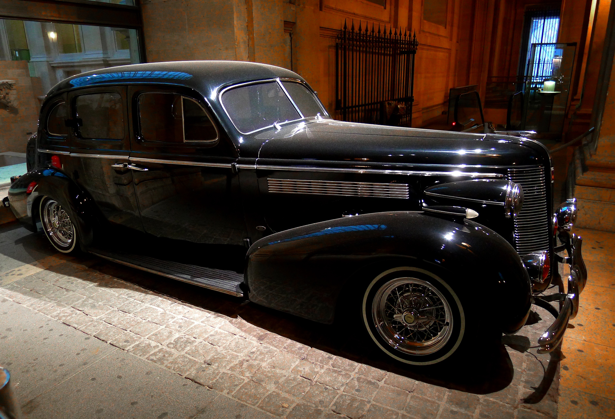 1937 Buick Special Series 40 4-Door Sedan La Buick de Fernando Reulas (surnommée The Black Crow), fondateur du club des Dukes à Los Angeles (voiture exposée au Louvre)